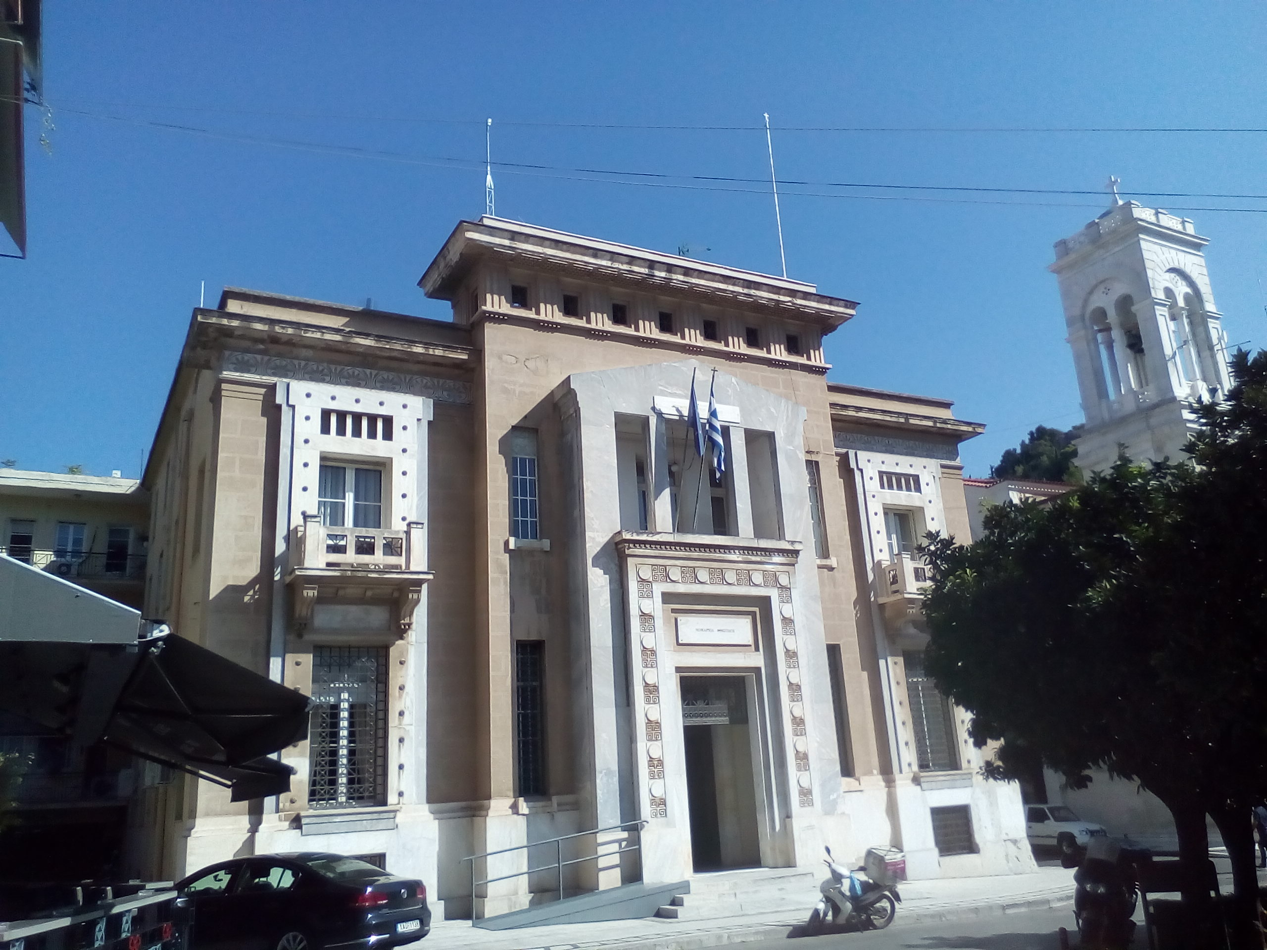 Μέγαρο Περιφέρειας Στερεάς Ελλάδας«Μέγαρο Περιφέρειας Στερεάς Ελλάδας»